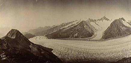 Glacier d'Aletsch